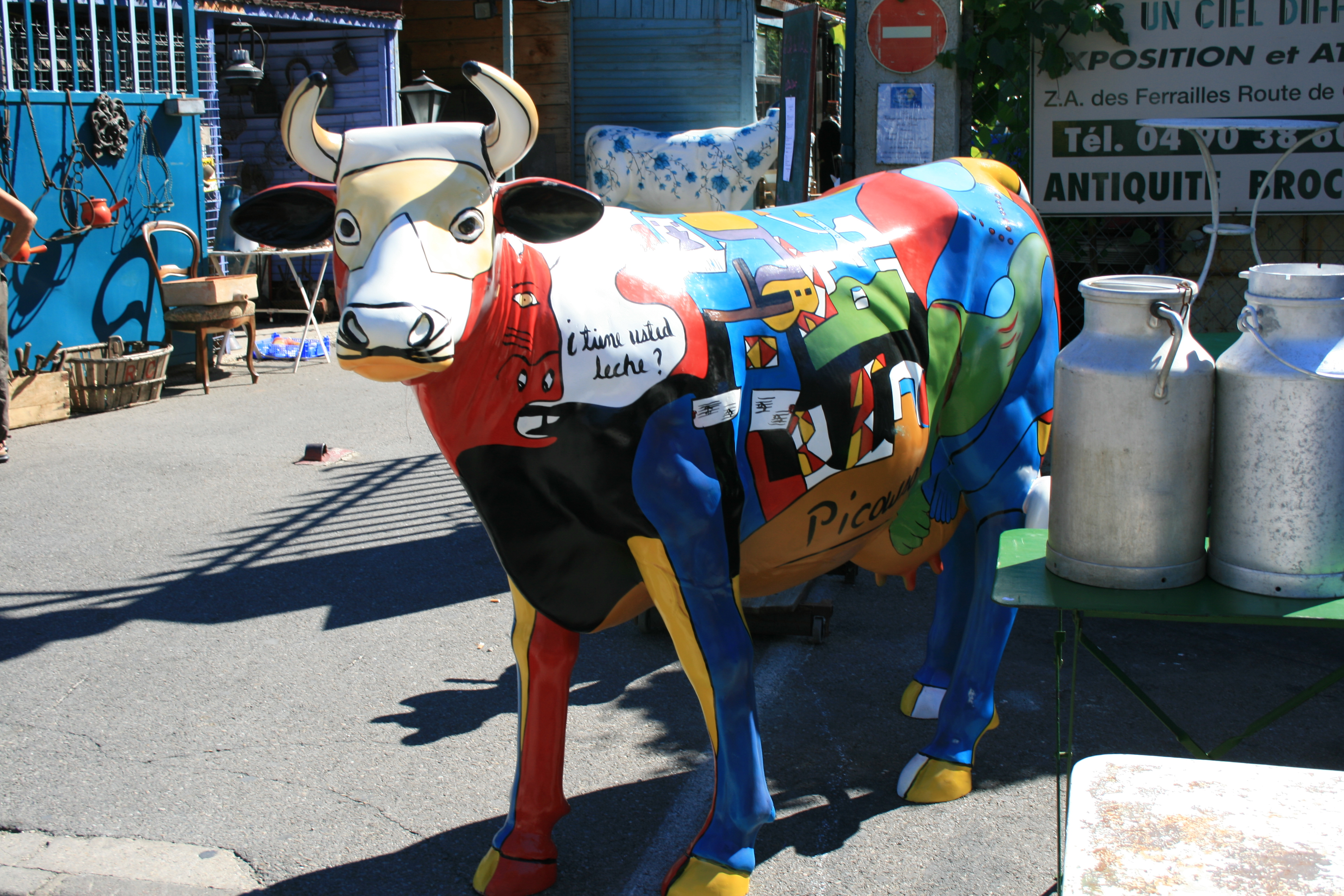 Vache multicolore à l'Isle-sur-la-Sorgue (Vaucluse, France).